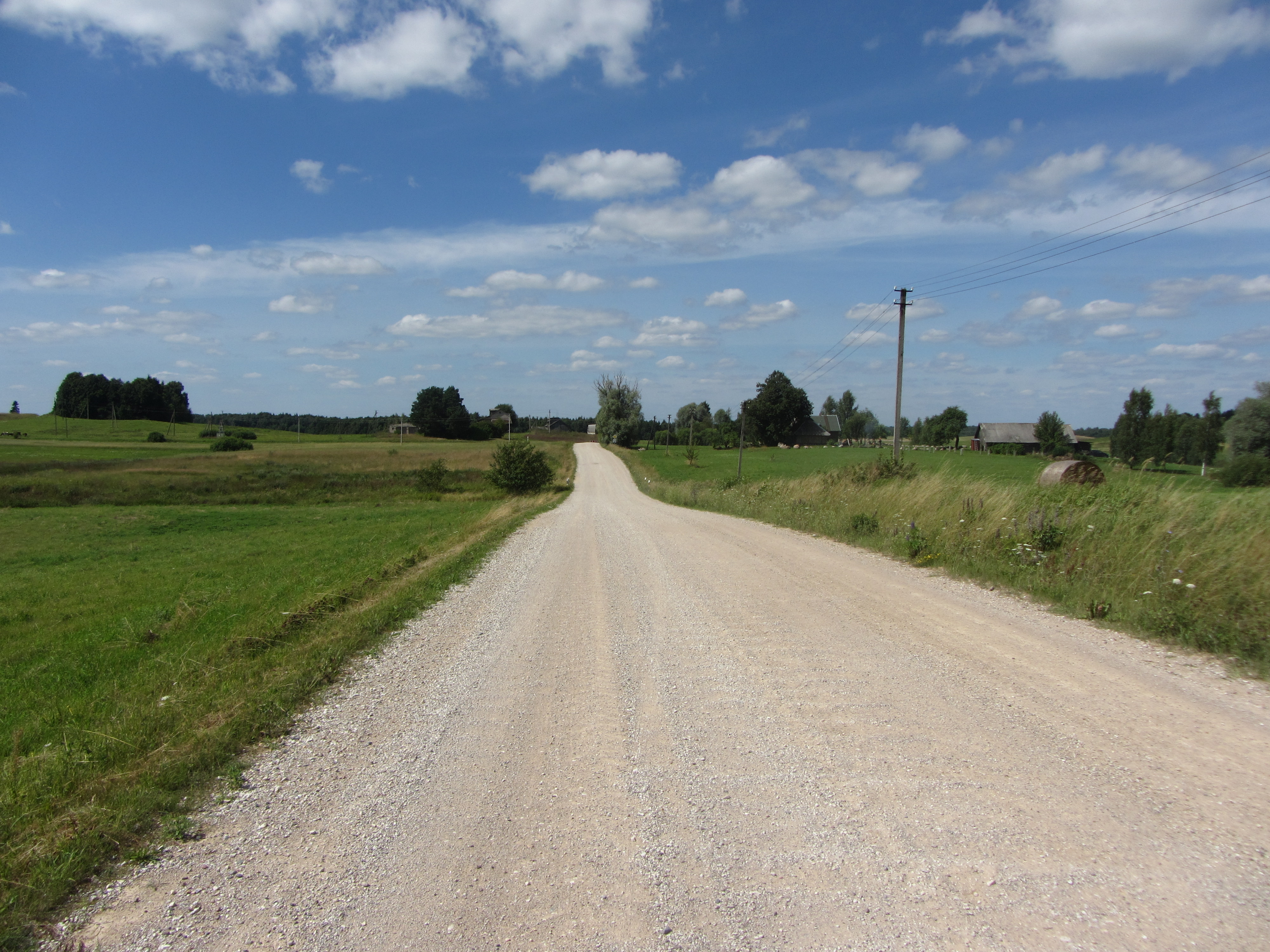 Liveikiai 28362, Lithuania